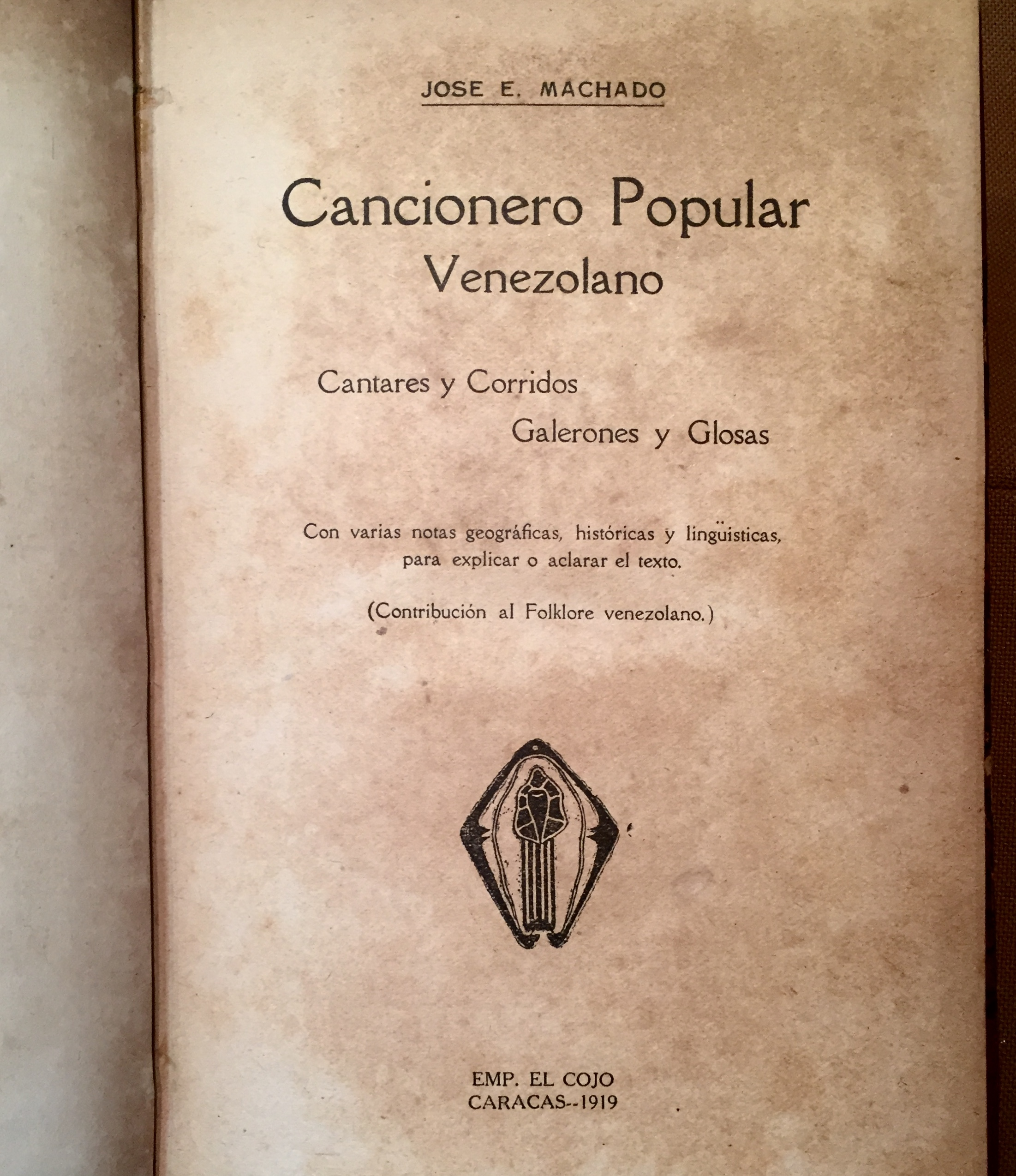 Portada del libro Cancionero Popular Venezolano, de José Eustaquio Machado, 1919.